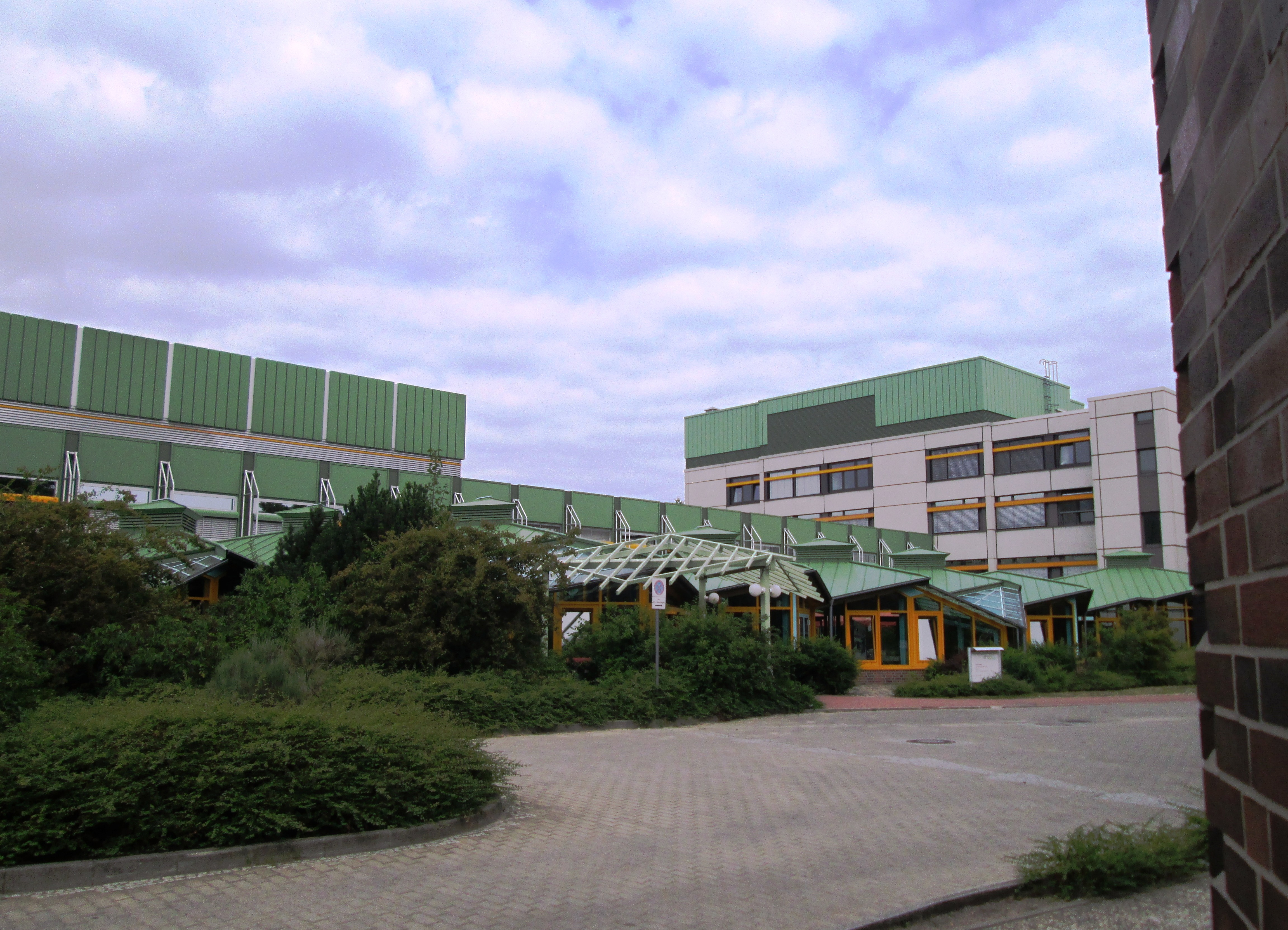 Evangelisches Waldkrankenhaus Berlin-Spandau